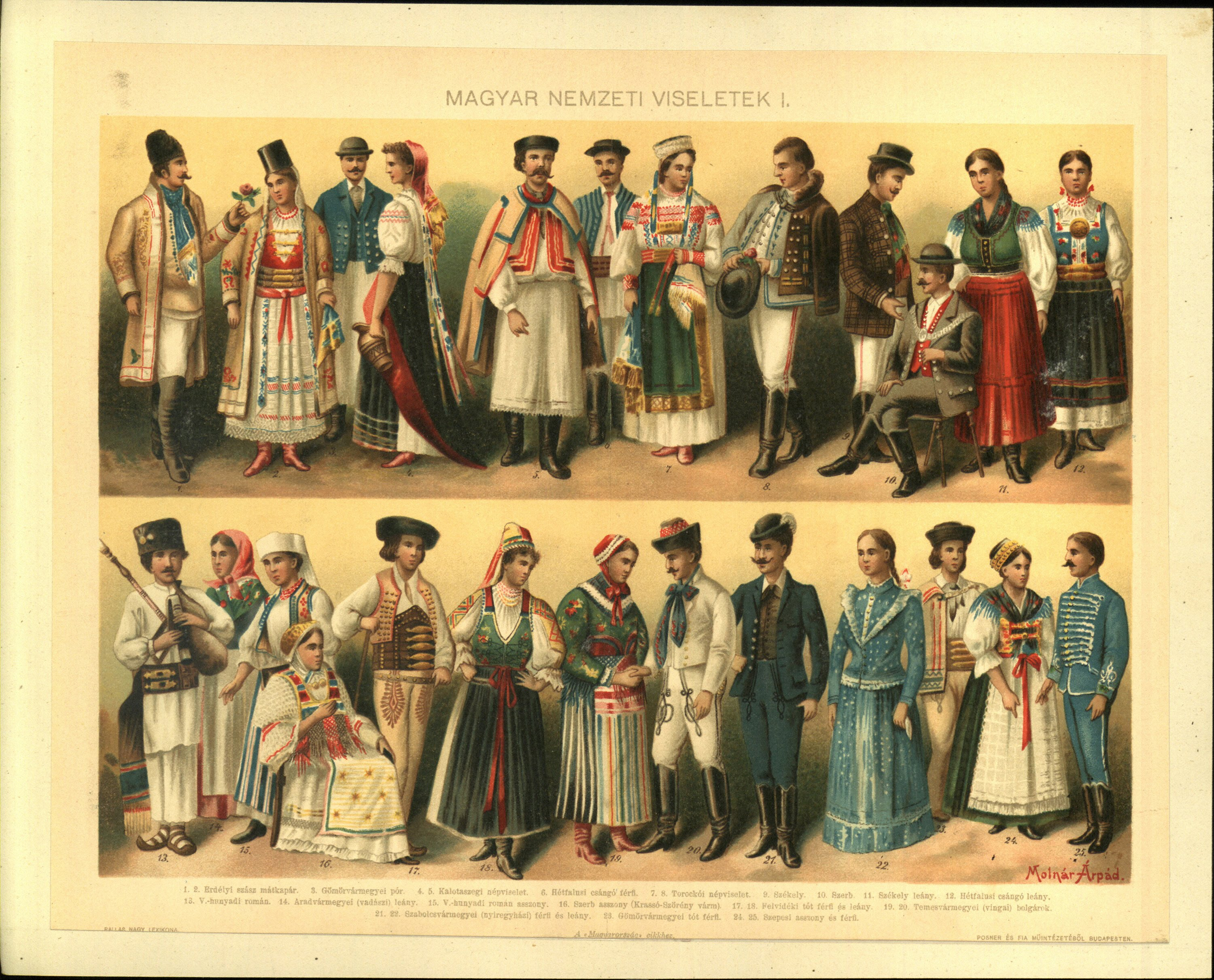 Nagy Géza-Nemes Mihály A magyar viseletek története. 1900-ban jelent meg Nagy Géza régész, etnográfus, a Magyar Nemzeti Múzeum régiségtárának őre (1855-1915) és Nemes Mihály (1866-1945) festő, illusztrátor és jelmeztervező műve, a Magyar viseletek története. Színes és fekete-fehér képtábláit nem mindig szakszerűen válogatva készítette el a művész, sokszor dolgozott másolatokból, de az eredeti forrásokat is átfogalmazta, a 19. század végi magyar művészetére